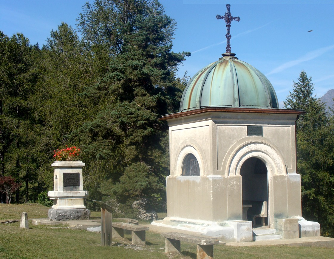 Le mausolée édifié par Antoine Taix à Notre-Dame de Bois-Vert (commune de la Fare-en-Champsaur, Hautes-Alpes) en souvenir de sa mère. En retrait à gauche, une stèle à sa sœur Rosa.